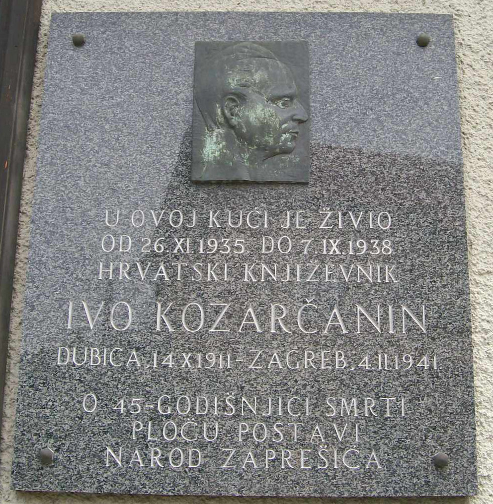 Spomen ploča Ivo Kozarčanin, Zaprešić